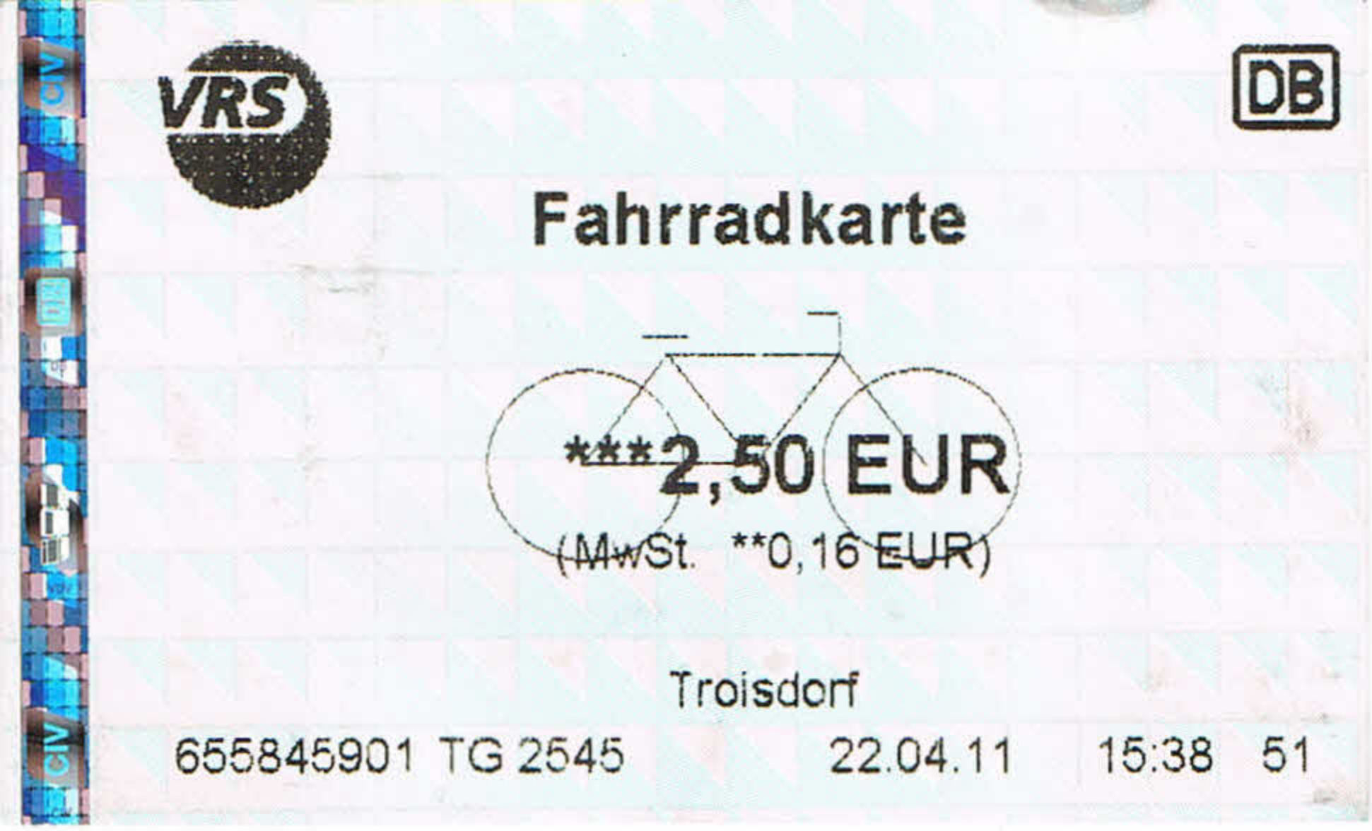 Fahrradkarte für den Verkehrsverbund Rhein-Sieg (VRS), ausgegeben durch die Deutsche Bahn aus einem Automaten in Troisdorf. Preis: EUR 2,50